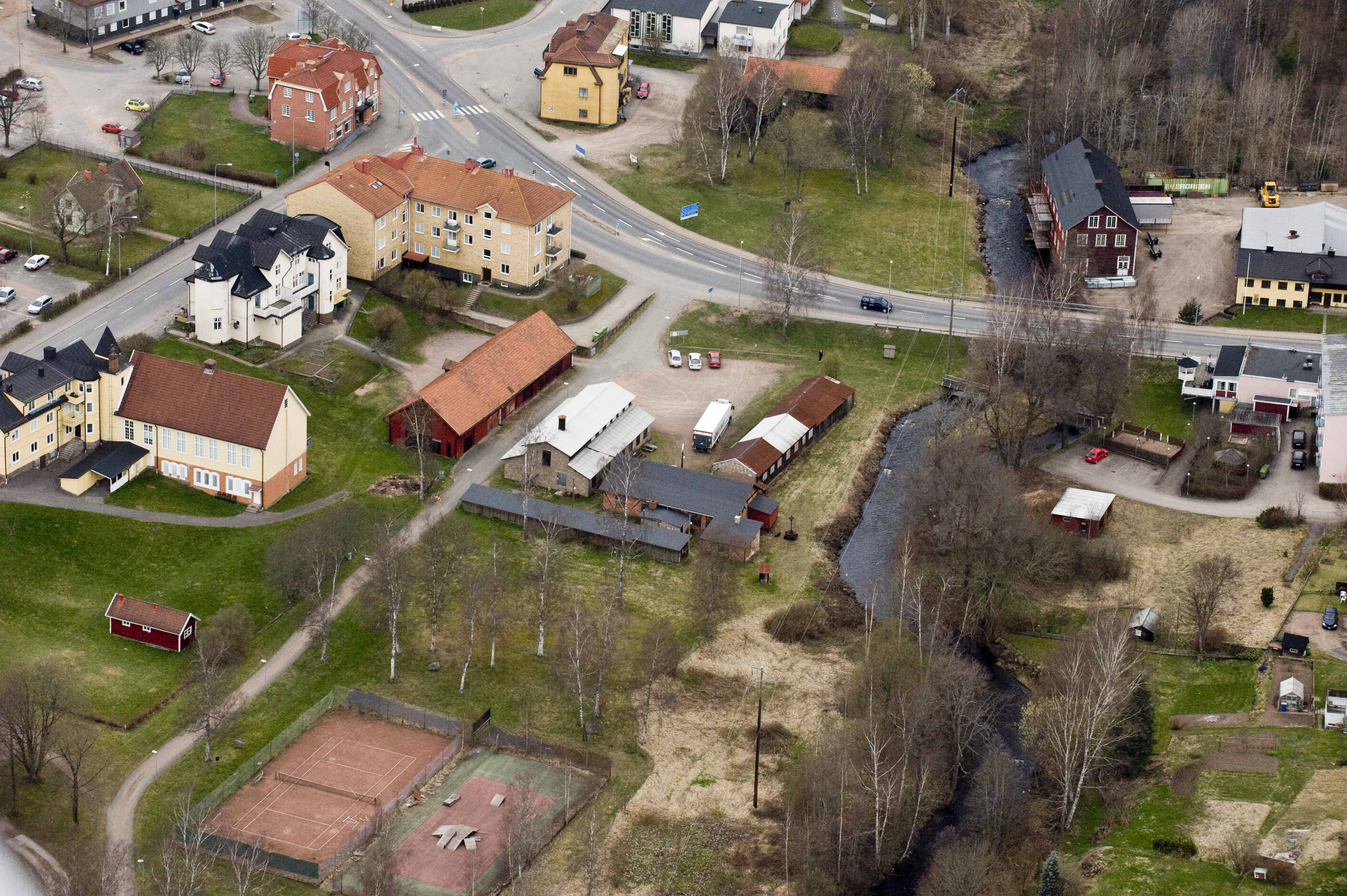 Julles gjuteri från luften